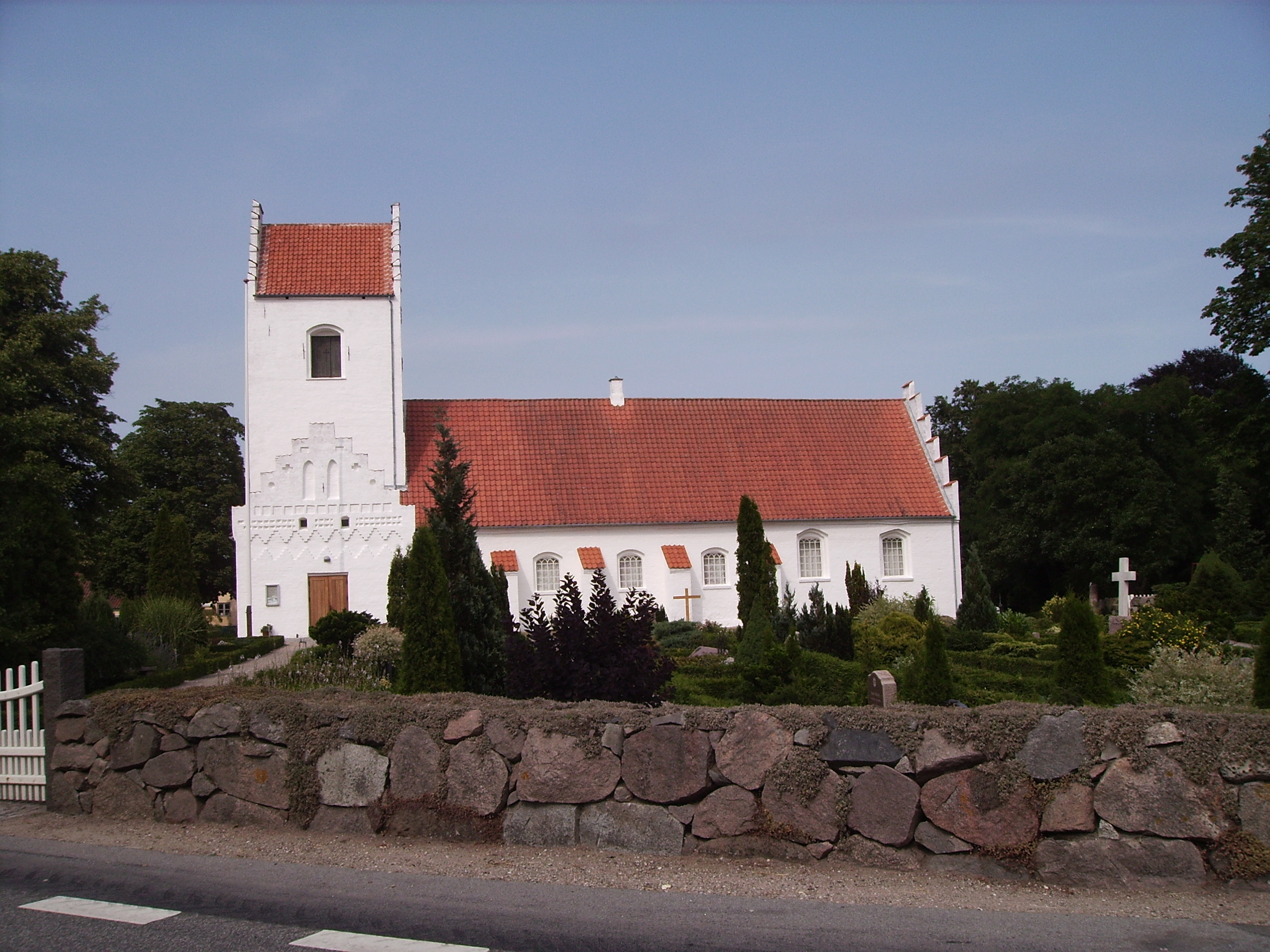 Marslev Kirke, Marslev Sogn, Bjerge Herred, Odense Amt, Denmark (Danish Church) Date: 27.07.2006 Photographed by Søren Møller